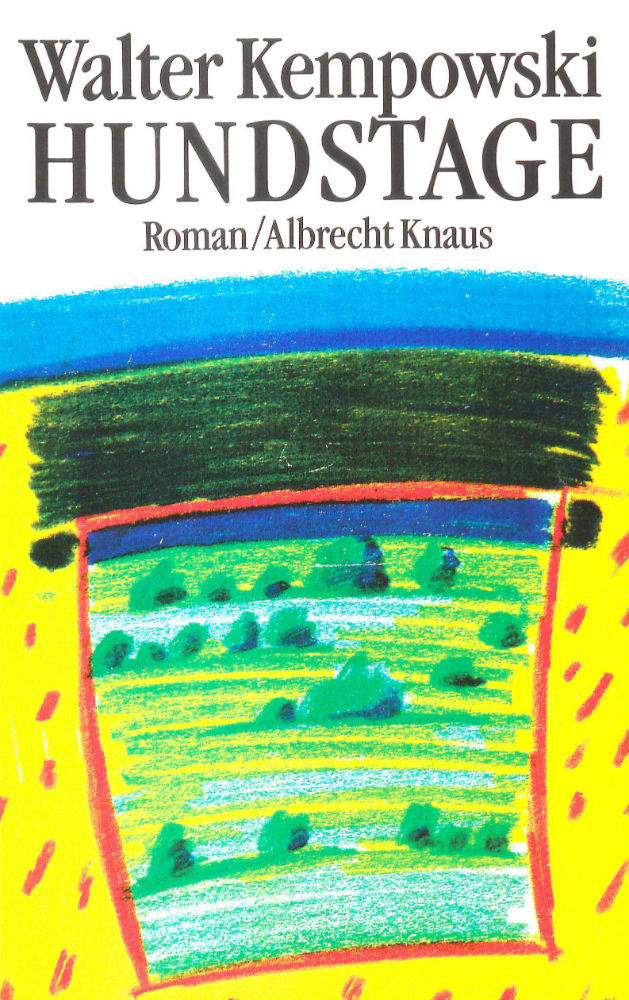 Walter Kempowski: Hundstage. Albrecht Knaus Verlag, München 1988. DNB